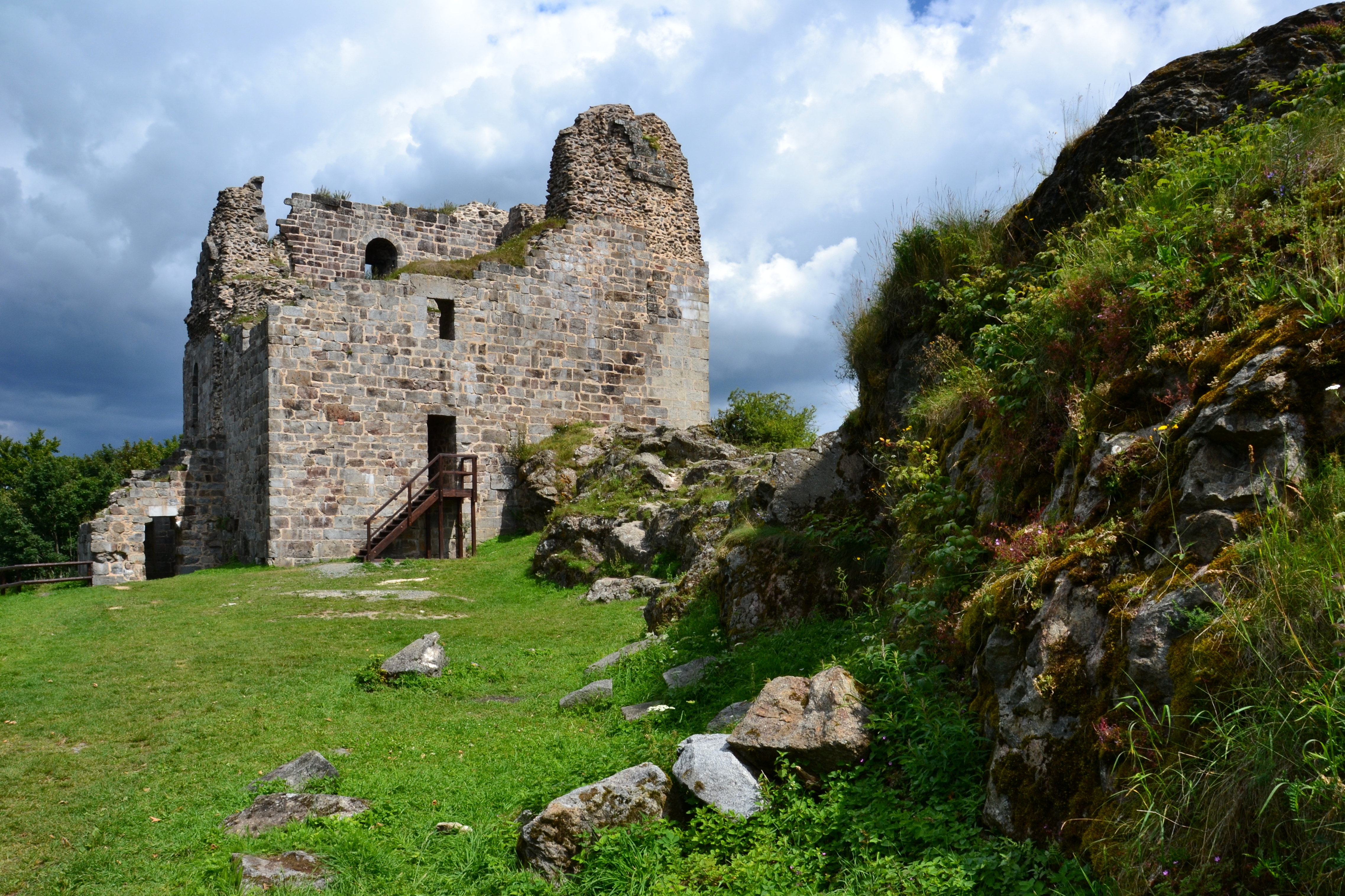 Nádvoří s donjonem, Hrad Přimda, jihojihovýchodně od Tachova na kopci severozápadně od Přimdy, st. 505 a další parcely, Přimda.